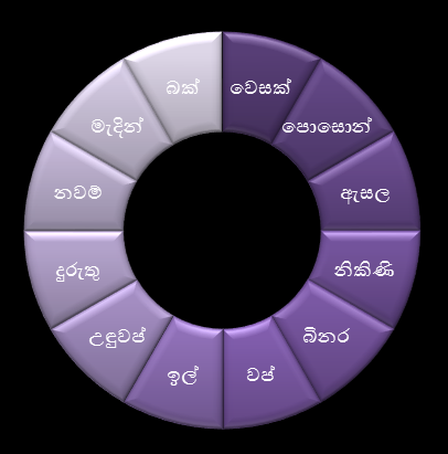 සිංහල: අධි මාස නැති චන්ද්‍ර අවුරුද්දක මාස